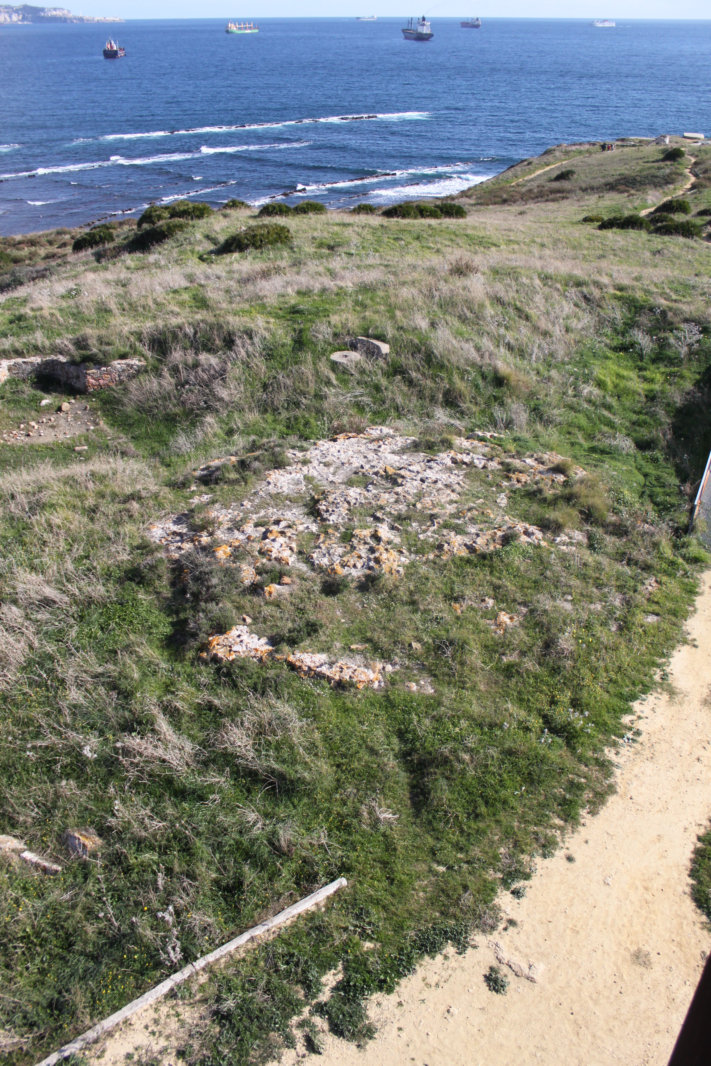 Restos de la torre de San García en la punta de San García, Algeciras, Andalucía, España